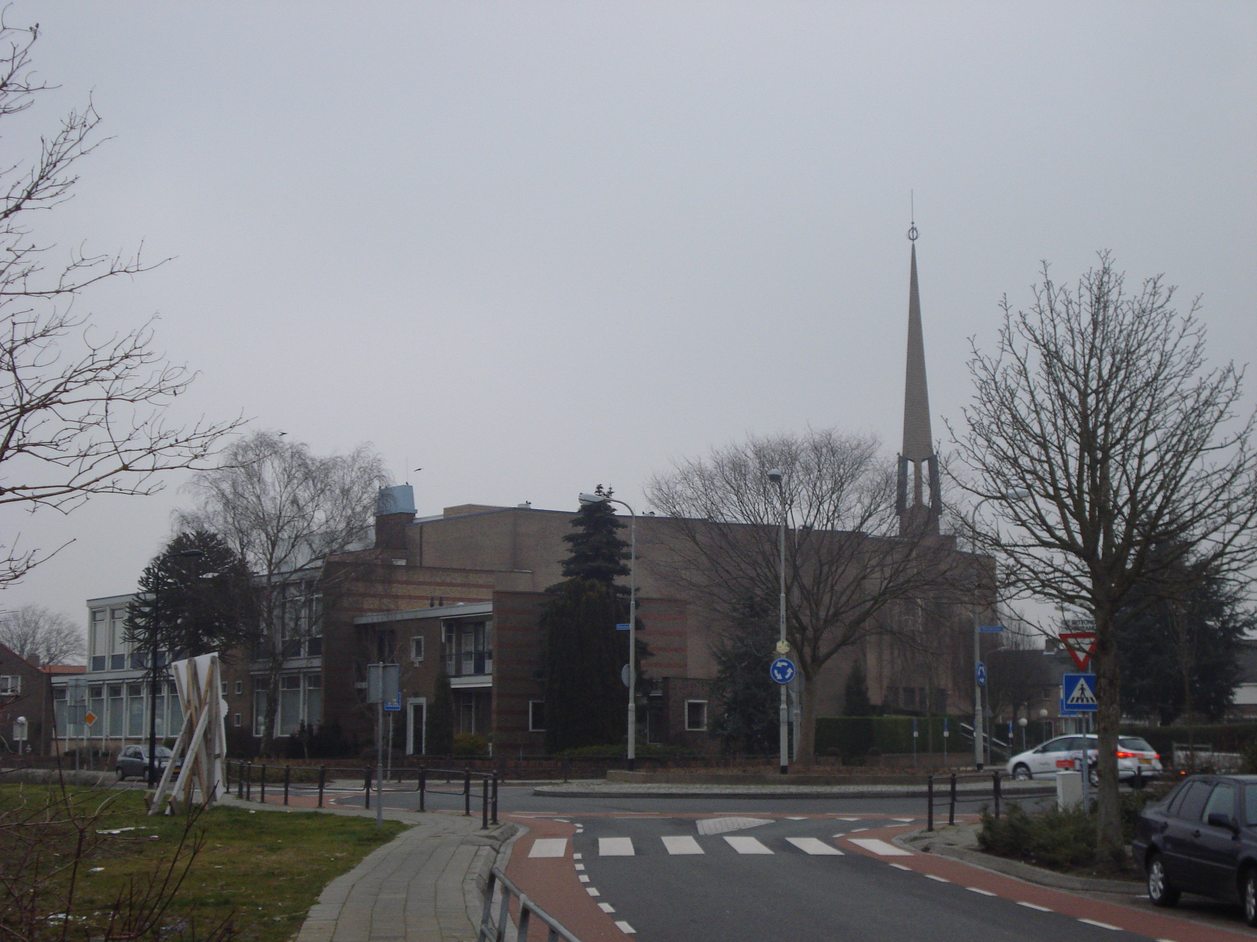 Kerkgebouw Gereformeerde Gemeente te Yerseke